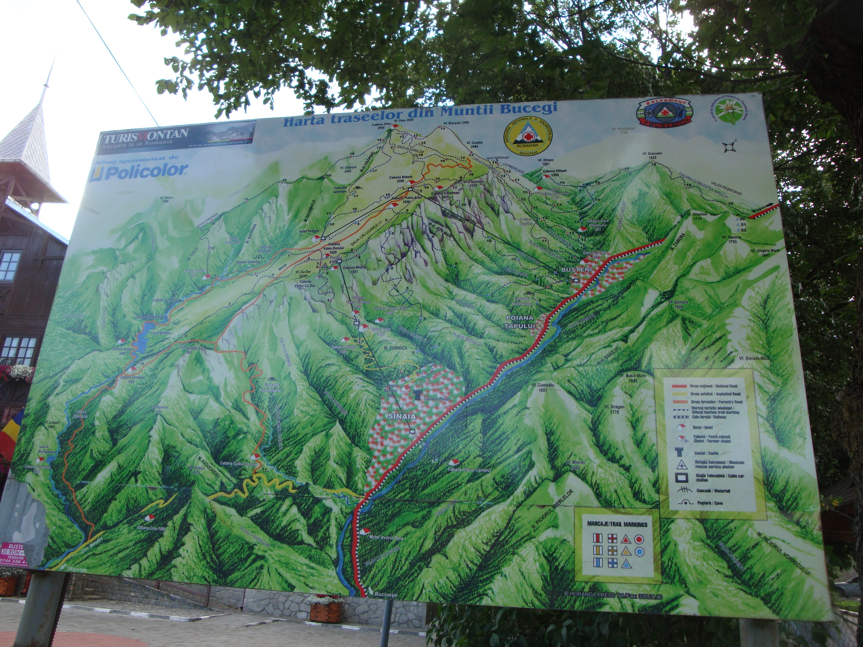 Trasee marcate din Munţii Bucegi